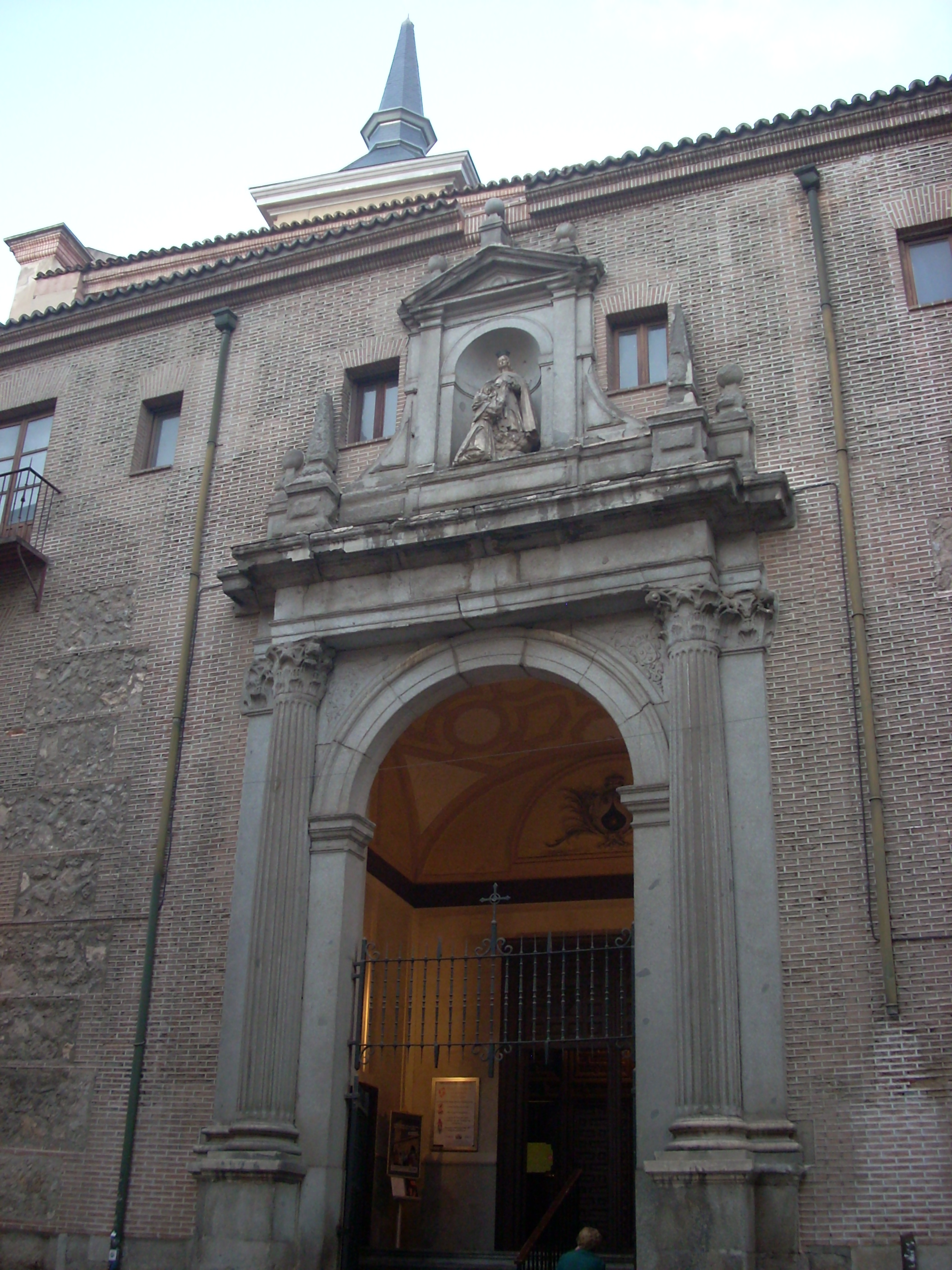 Fachada de la iglesia del Carmen, antiguo convento de carmelitas calzados, en Madrid, España.